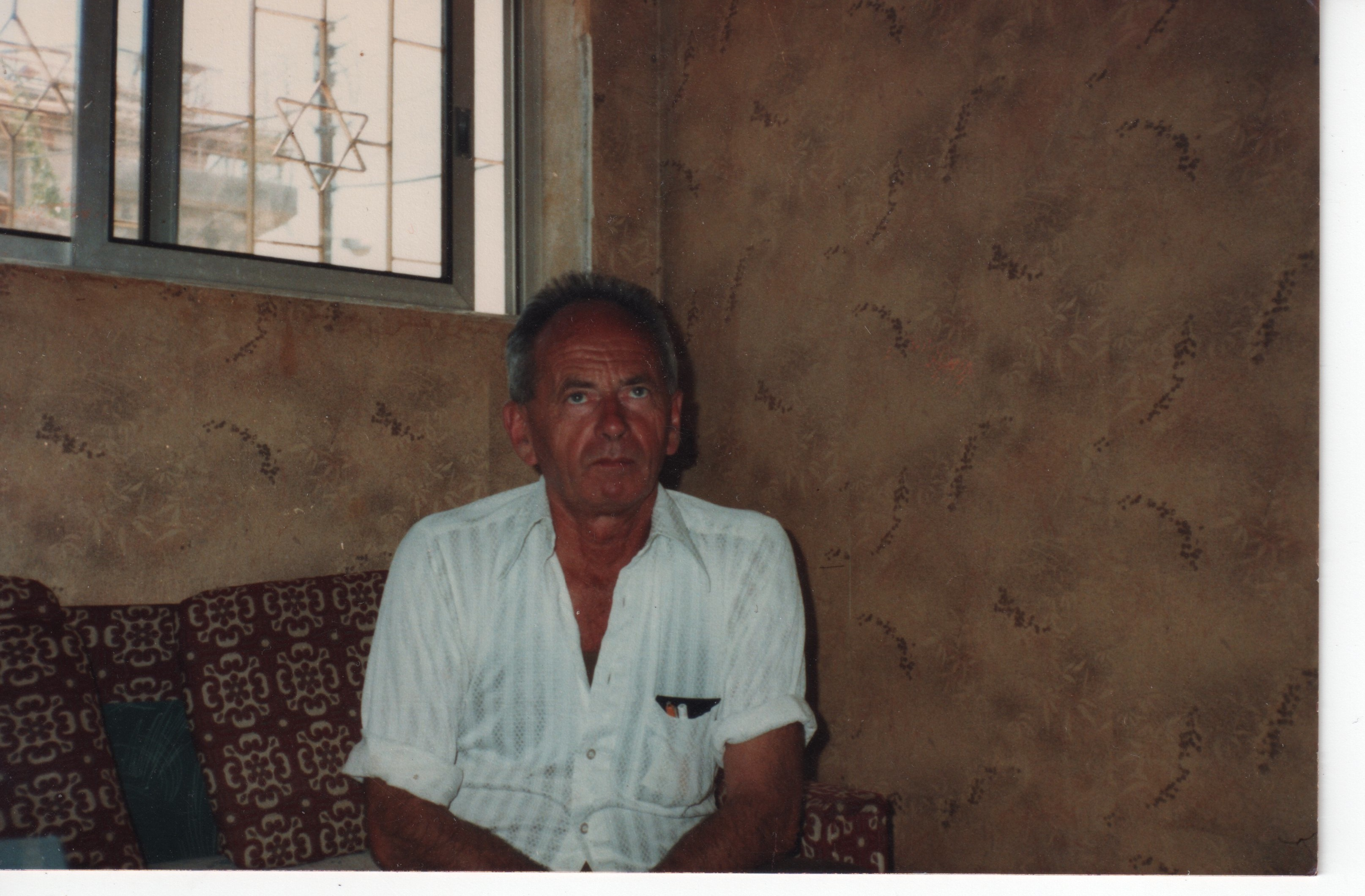 דוד סבו בביתו בירושלים